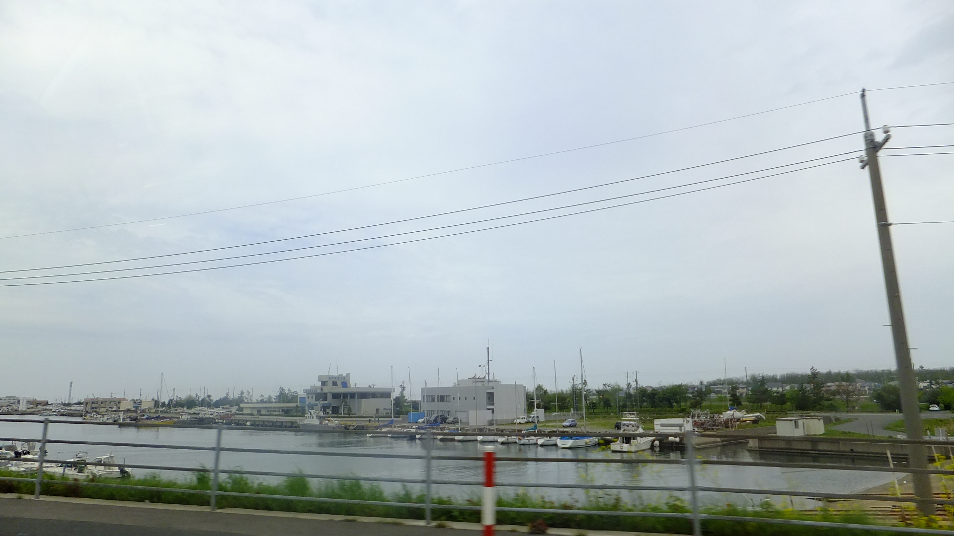 鳥取 港